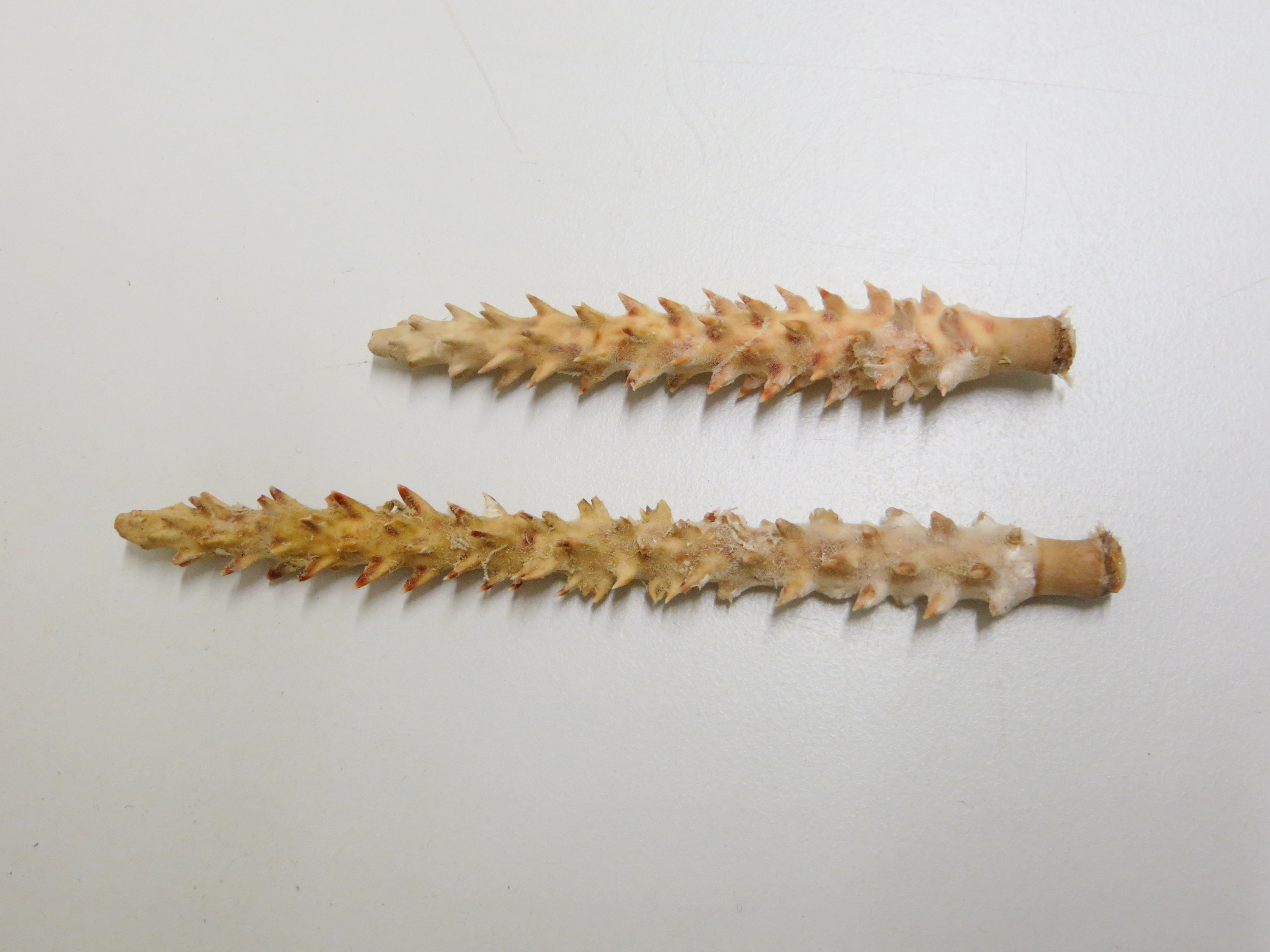 Radioles d'un Chondrocidaris gigantea (collection du Muséum National d'Histoire Naturelle).